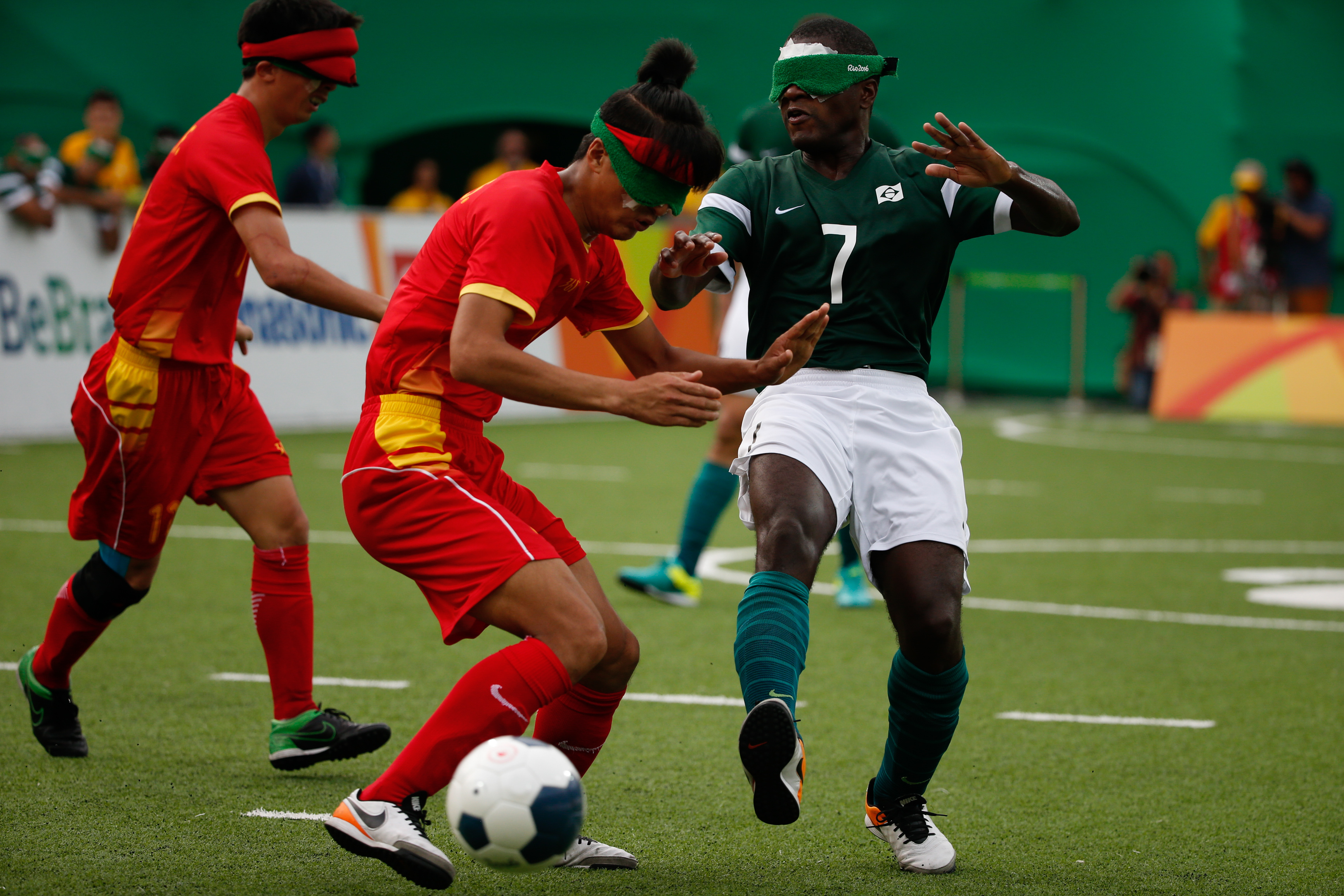 Rio de Janeiro - Brasil vence a China de virada por 2 a 1 e vai à final do futebol de 5 nos Jogos Paralímpicos Rio 2016 (Fernando Frazão/Agência Brasil)